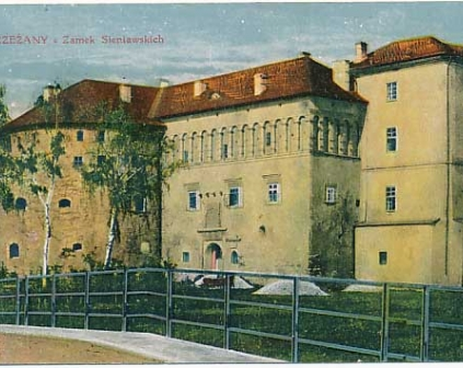 Pocztówka Brzeżany Zamek Sieniawskich